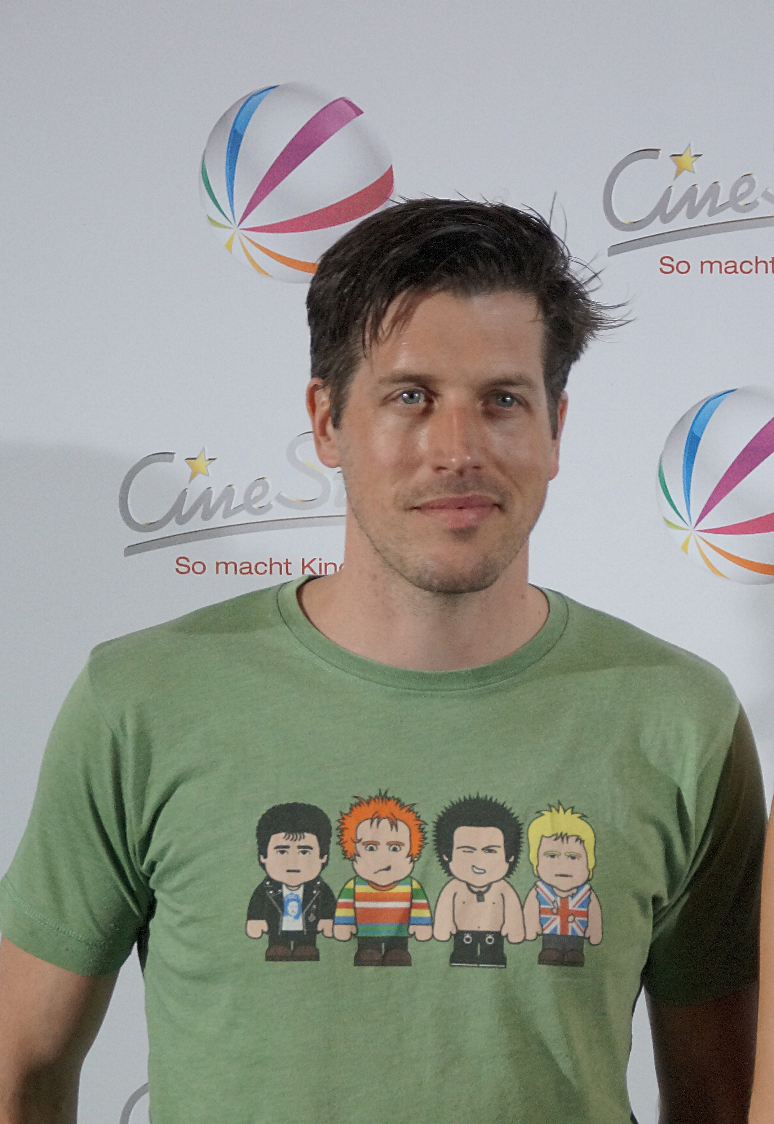 Nic Romm bei der Premiere des Sat.1 Filmes "Volltreffer", am 29.9.16, in Dortmund.